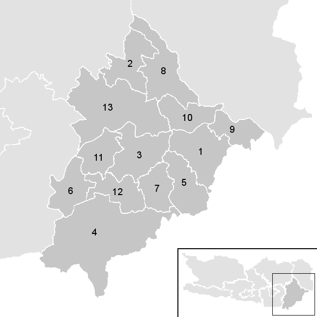 Leere Karte mit den Gemeinden im Österreichischen Bezirk Völkermarkt